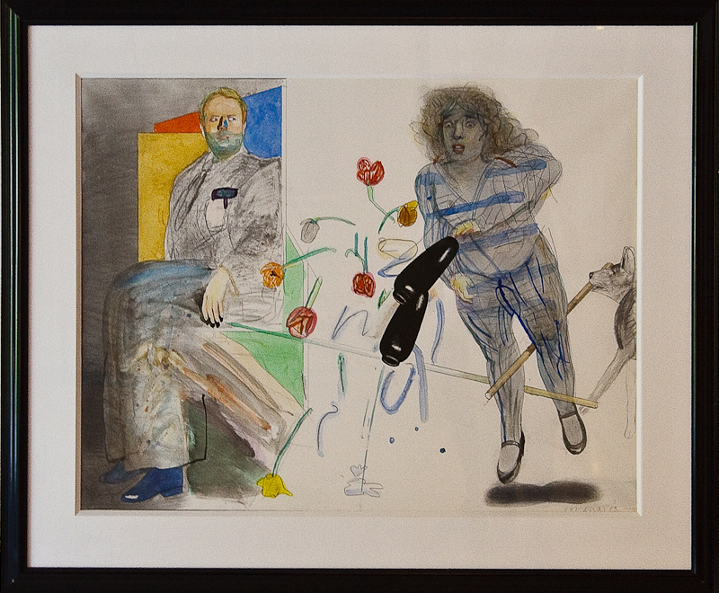 Pat Andrea De zwarte vaas 1980 gemengde techniek op papier Gewapende man en geschrokken vrouw die twee vazen laat vallen Pat Andrea The black vase 1980 mixed technique on paper Armed man and terrified woman drops two vases